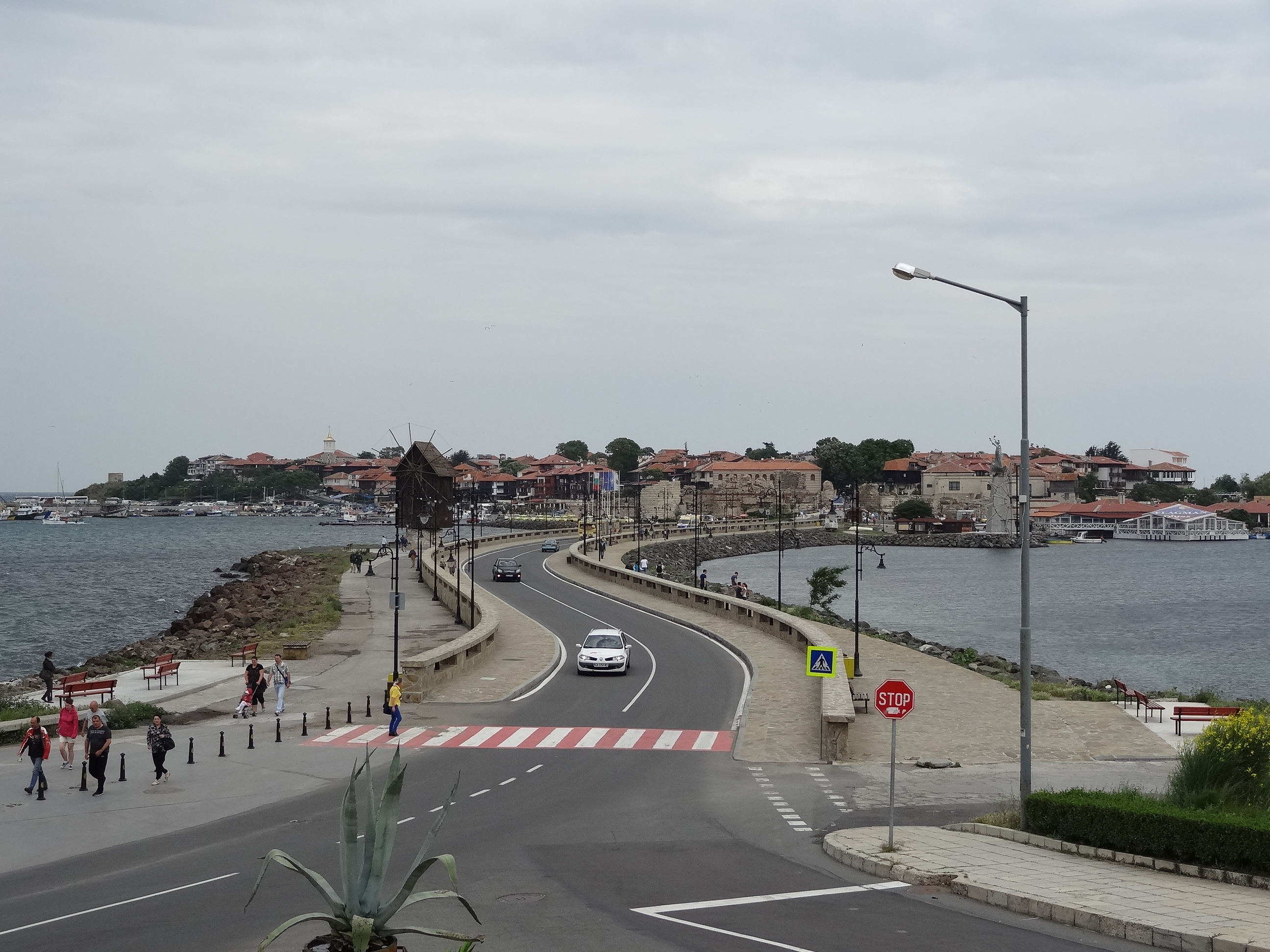 Views of Nesebar